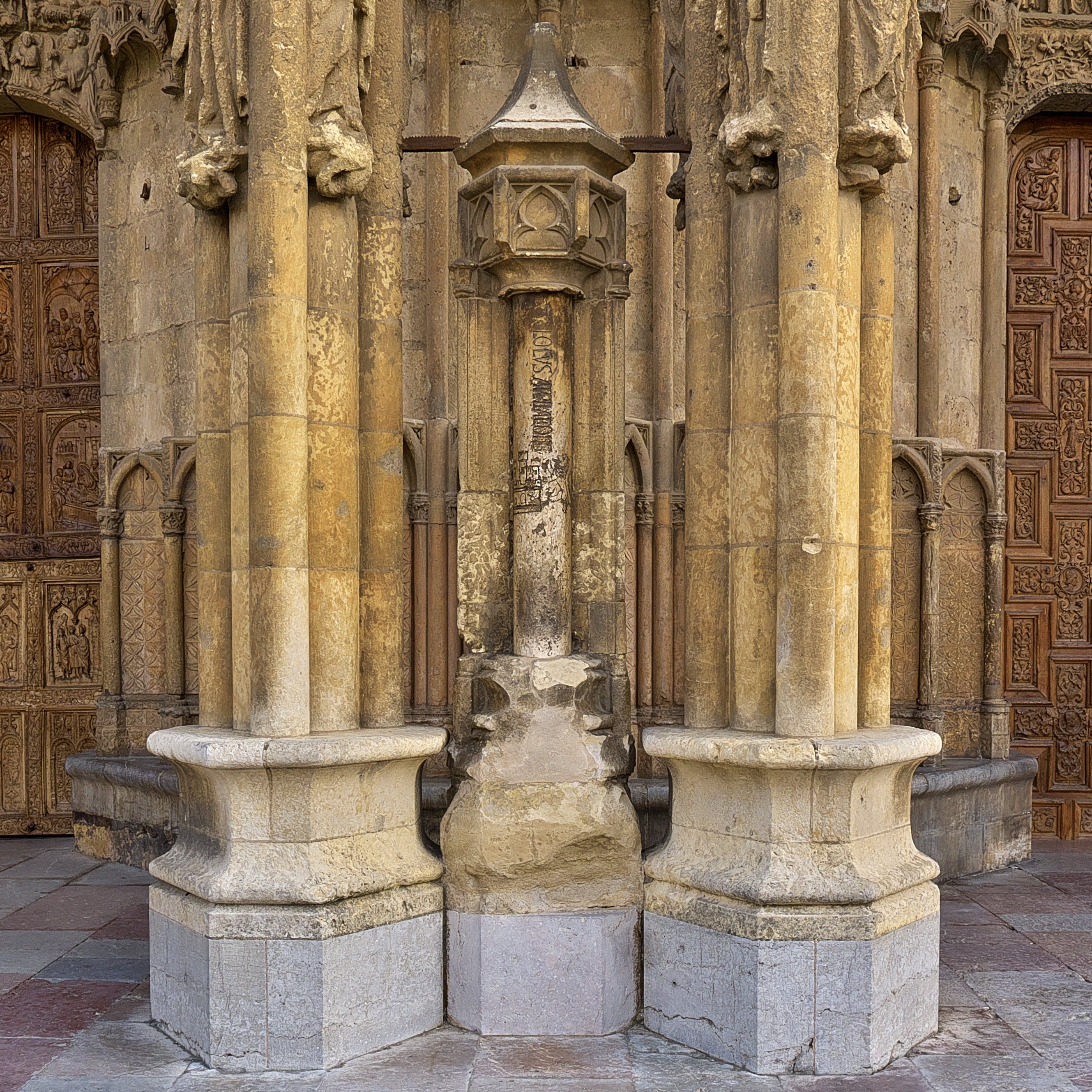 Lugar de las apelaciones de las decisiones de los jueces al Liber Iudiciorum, la ley promulgada por Recaredo, luego (Fuero Juzgo). Alfonso X en su calidad de primer juez por su condición real, instituye la justicia, al igual que en Chartres o Estrasburgo, en el pórtico existente en el hastial oeste de la catedral, para ello, queda señalizado, trasladando (ca. 1284) un valioso fuste marmóreo existente en San Isidoro.